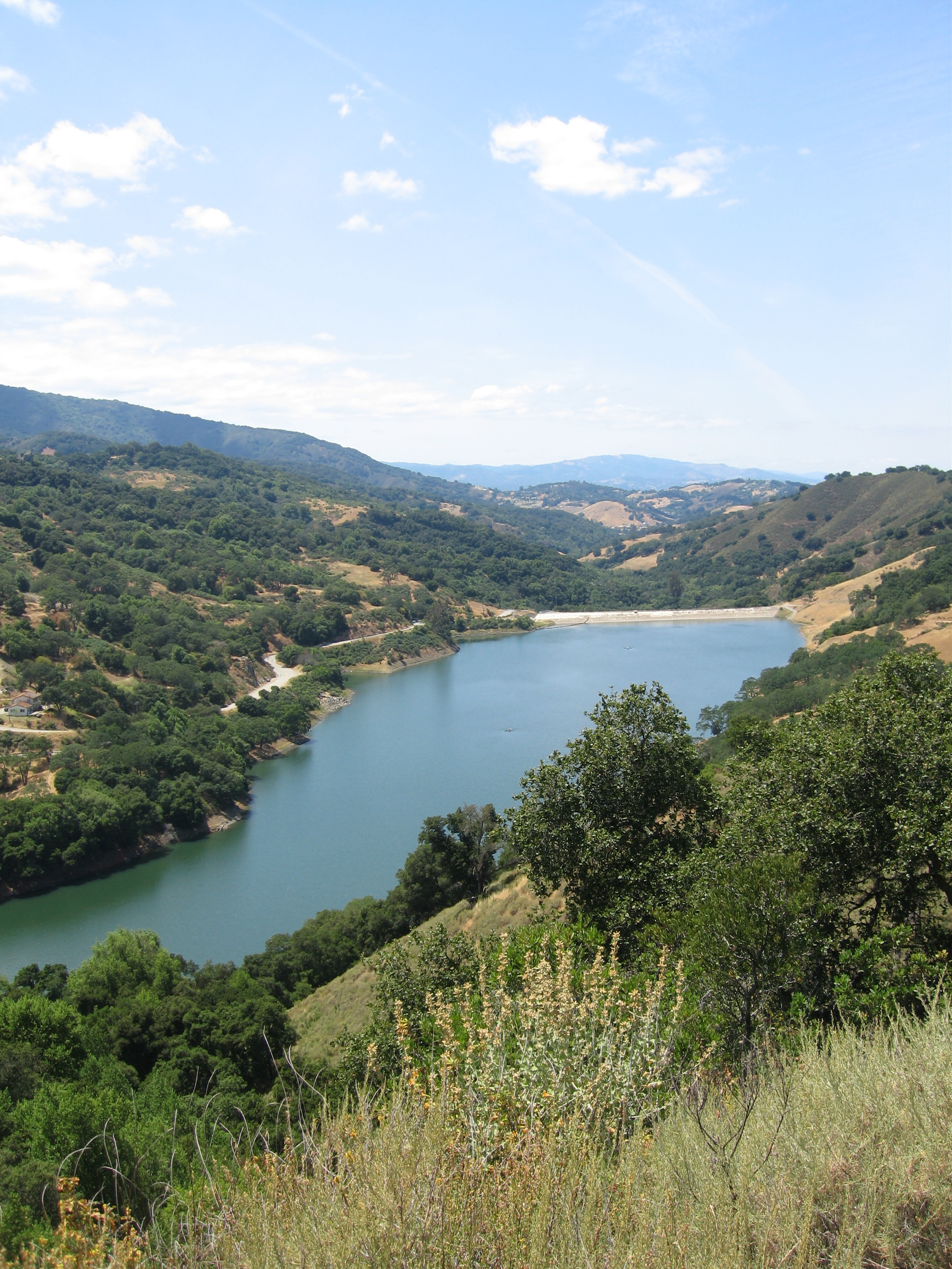 Guadalupe Reservoir, San Jose, CA